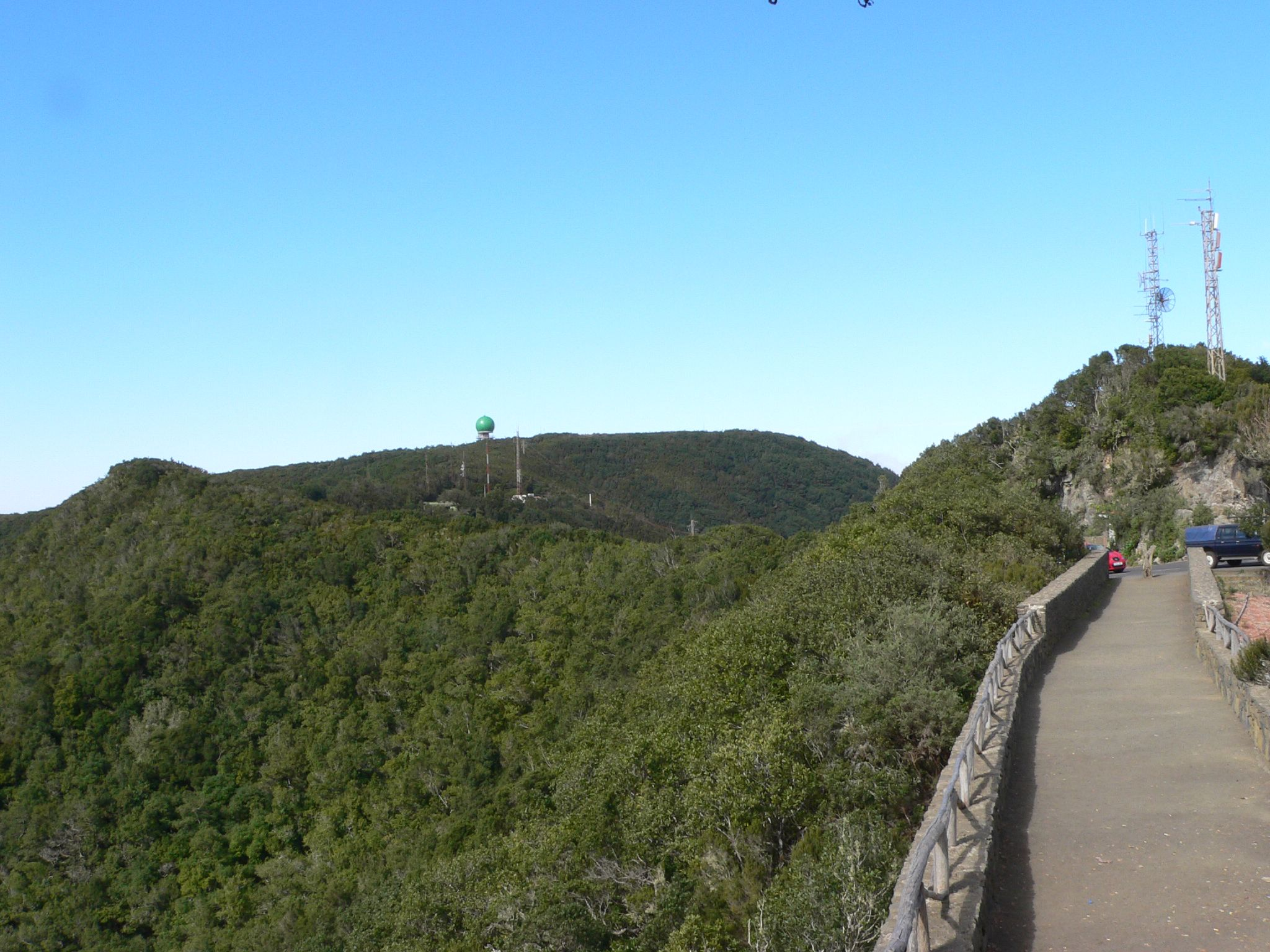 Mirador del pico del inglés